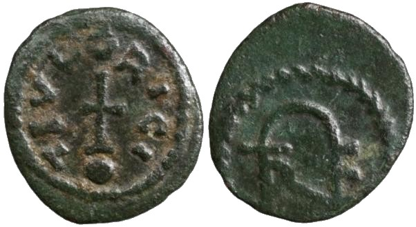 Monnaie de bronze de Thierry Ier (511-534). BNF, monnaies, médailles et antiques. Avers : Coix au-dessus d'un globe. Revers : Monogramme de Thierry.